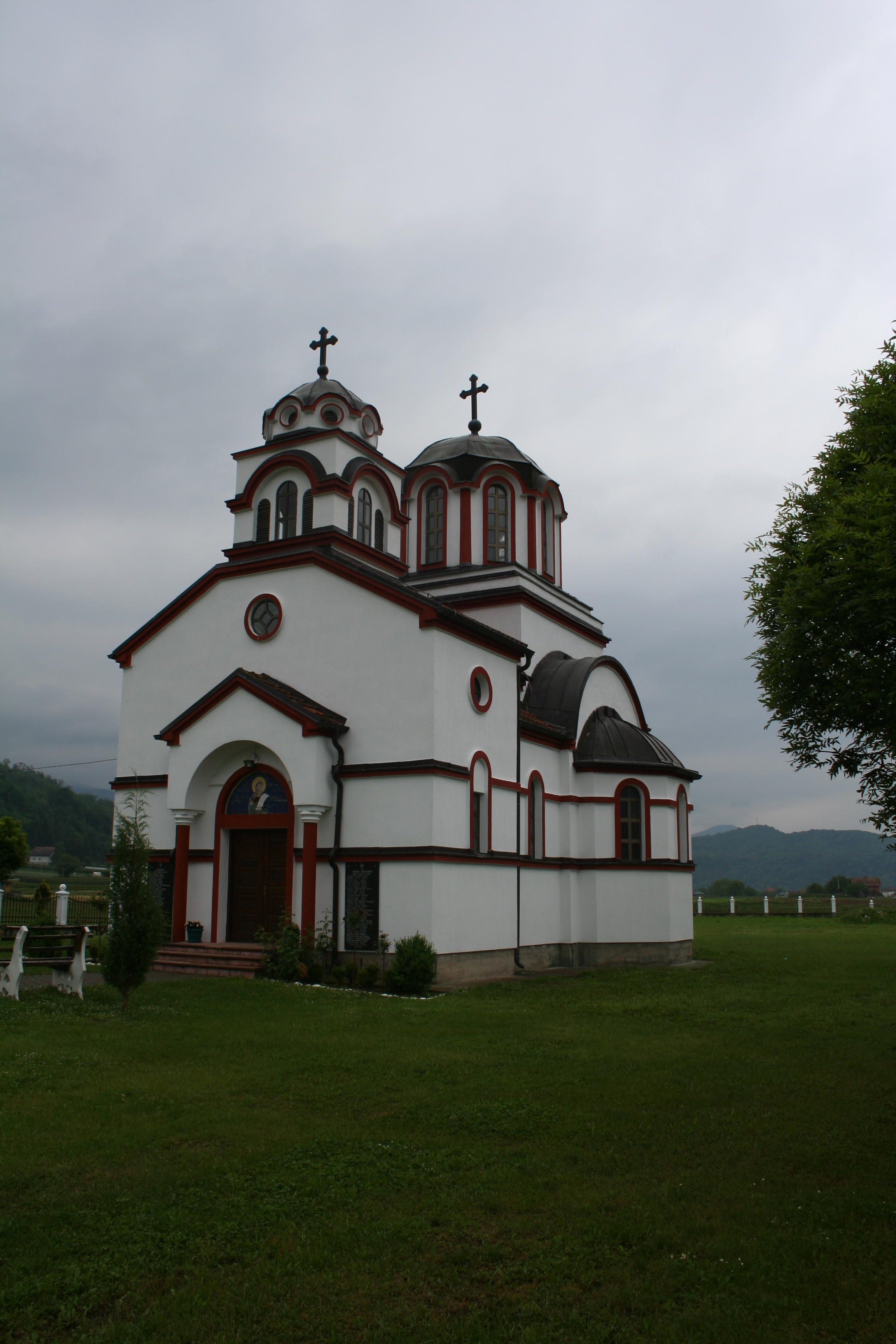 Crkva Sv. proroka Jeremije, Vrhpolje